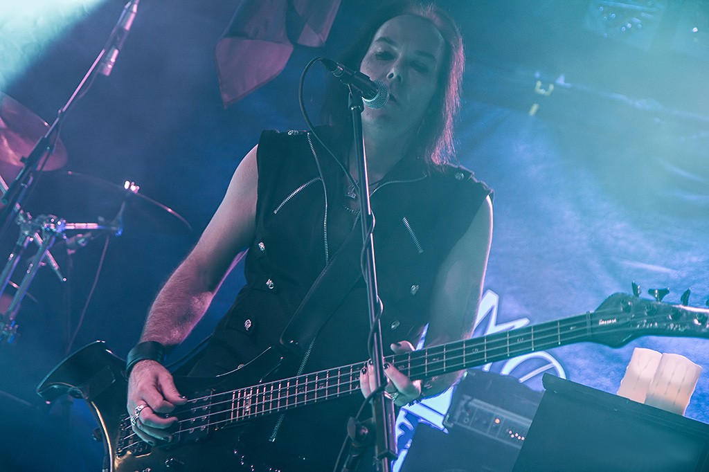 Lacrimosa